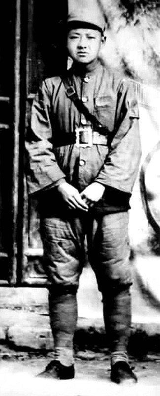 1932年发动两当兵变时的习仲勋。